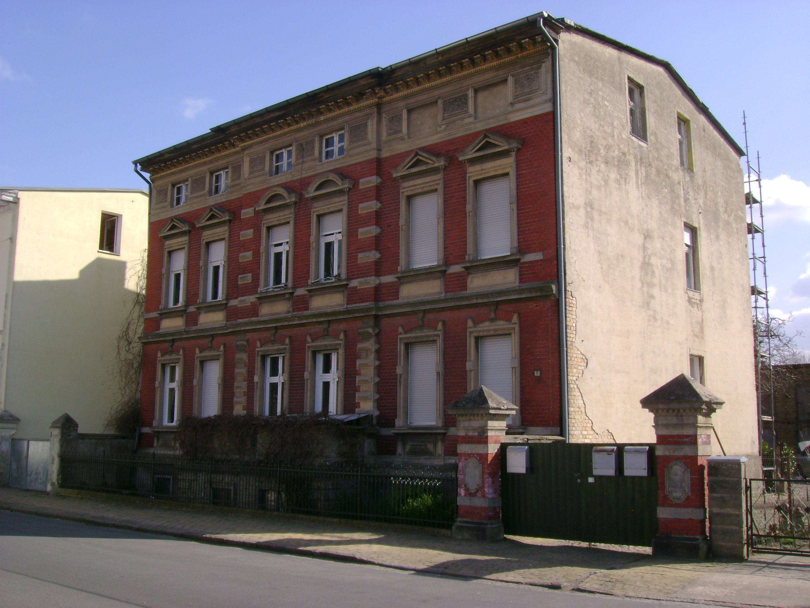 Denkmalgeschütztes Wohnhaus in Velten Verbindungsweg 9.